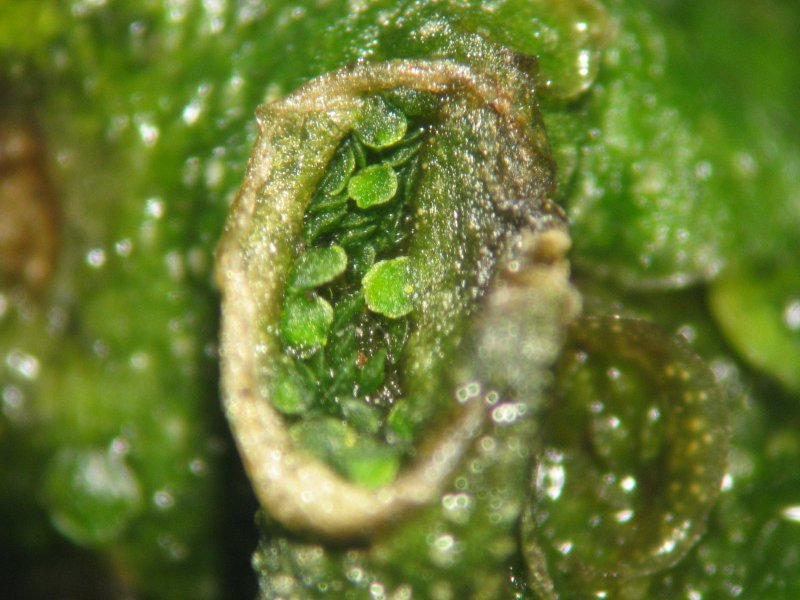 Mondbechermoos (Lunularia cruciata), Brutbecher, Rostock